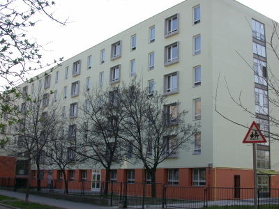 Az ELTE Nándorfejérvári úti kollégiumi épülete